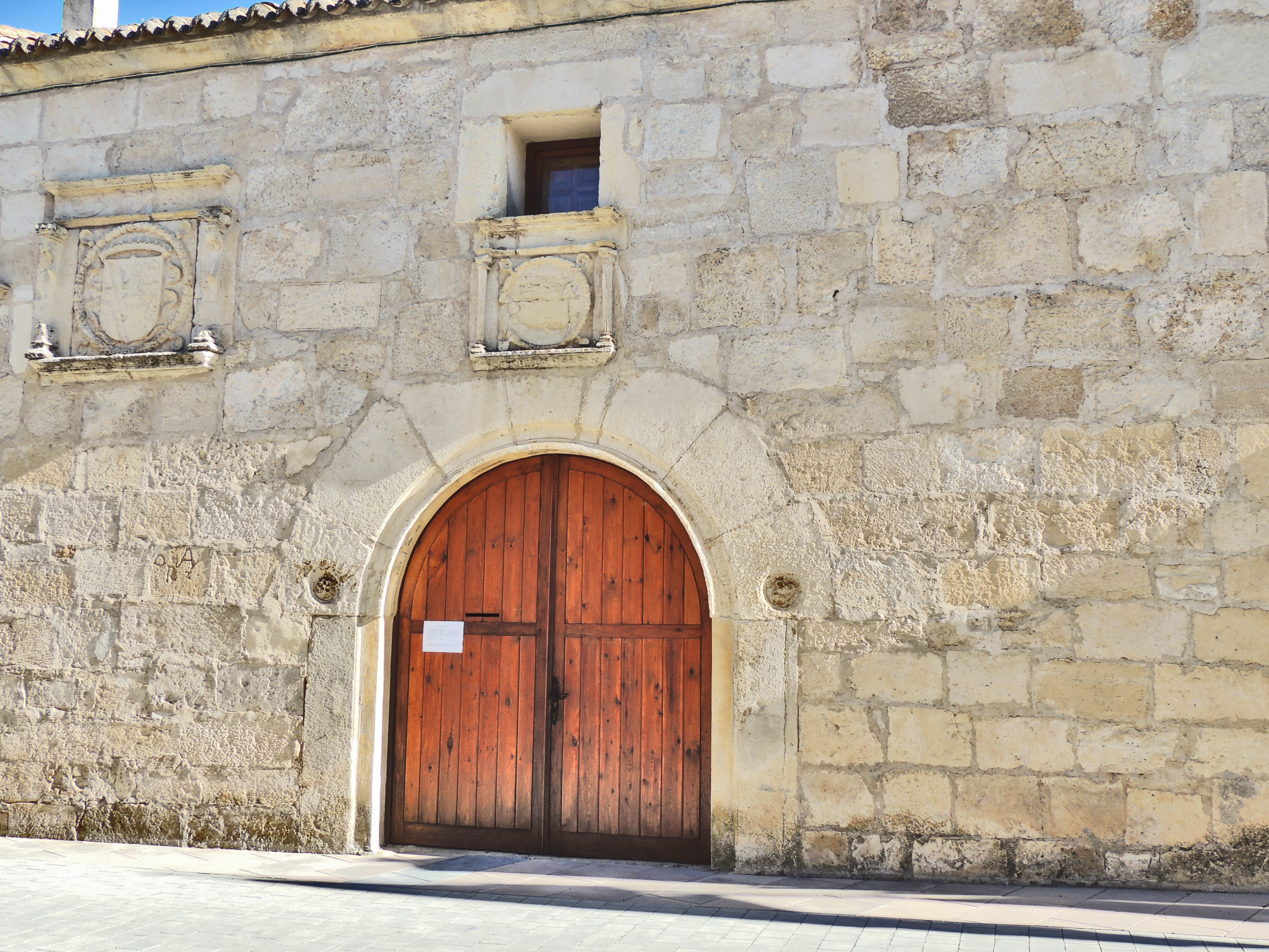 Palacio de los Mendoza, Tamajón (Guadalajara), España, plateresco s. XVI. Fachada oeste.